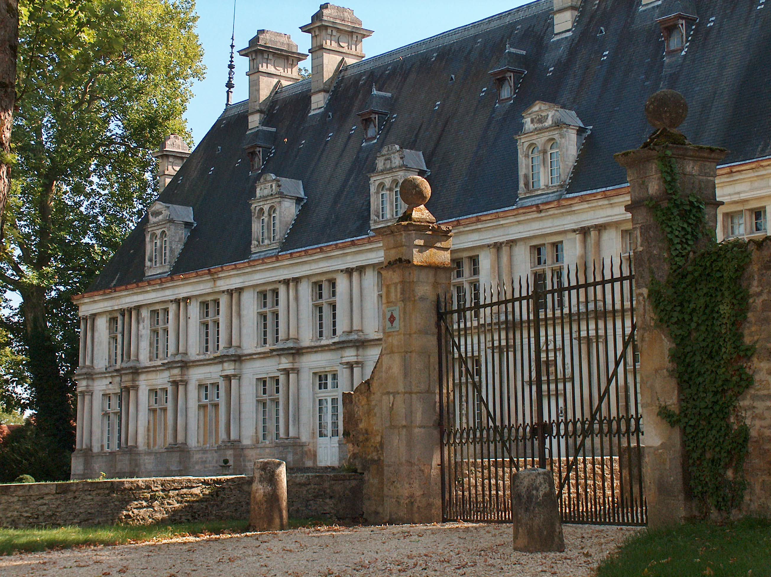 Entrée et façade This building is en partie classé, en partie inscrit au titre des Monuments Historiques. .